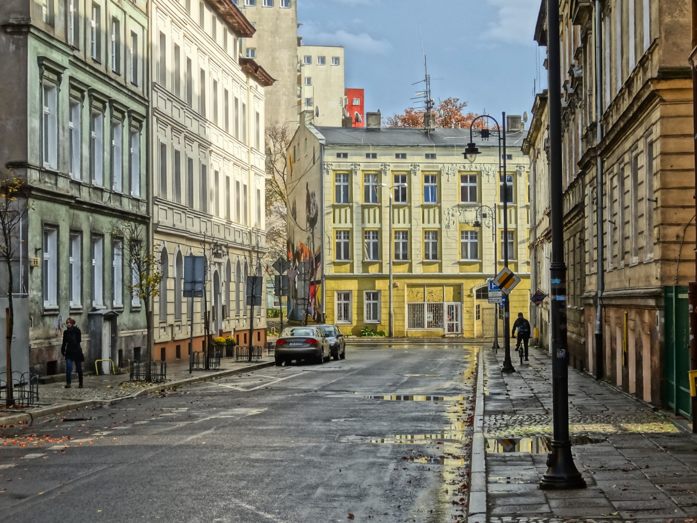 Ulica Piotra Skargi w Bydgoszczy